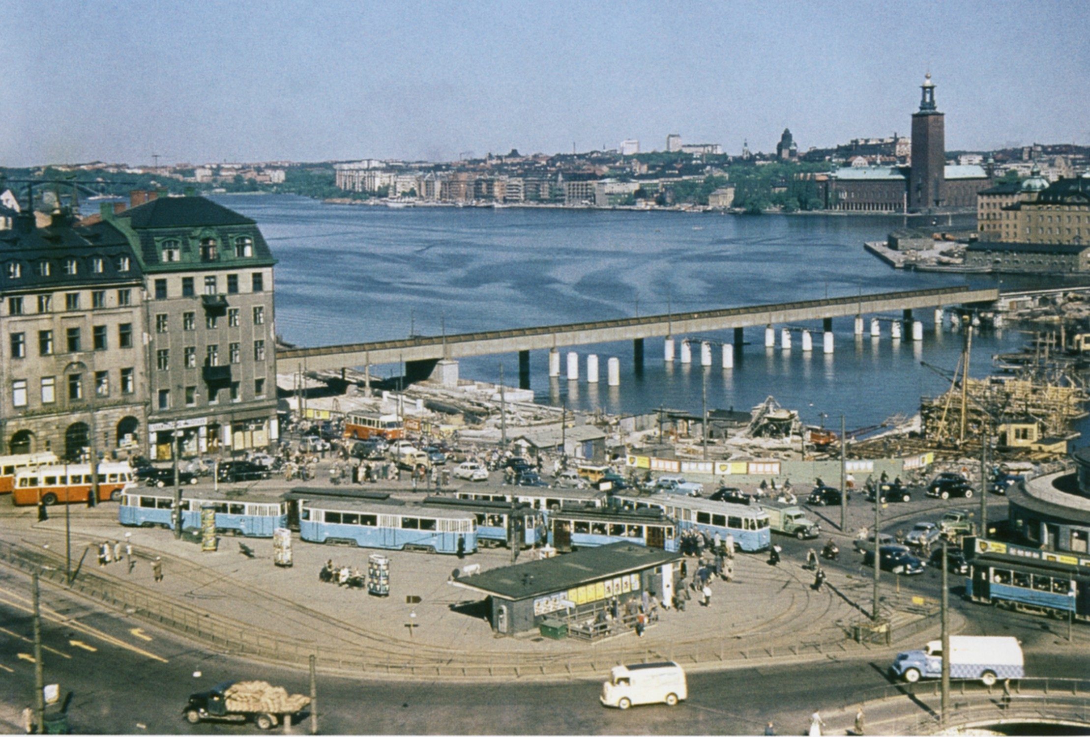 Utsikt över Slussenområdet från Katarinahissen 1956, Stockholm